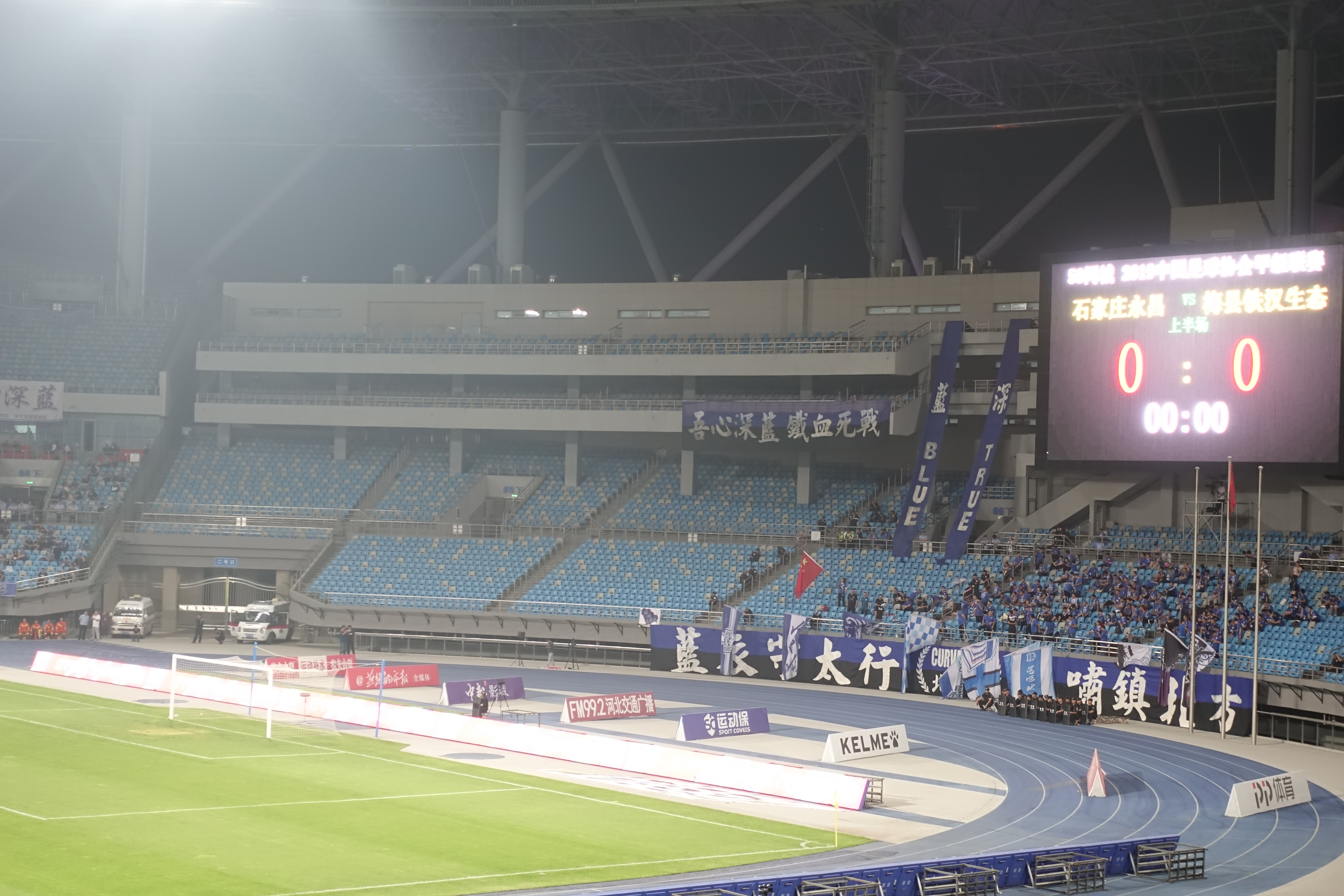 2019中国足球甲级联赛石家庄永昌vs广东华南虎，河北奥林匹克体育场。